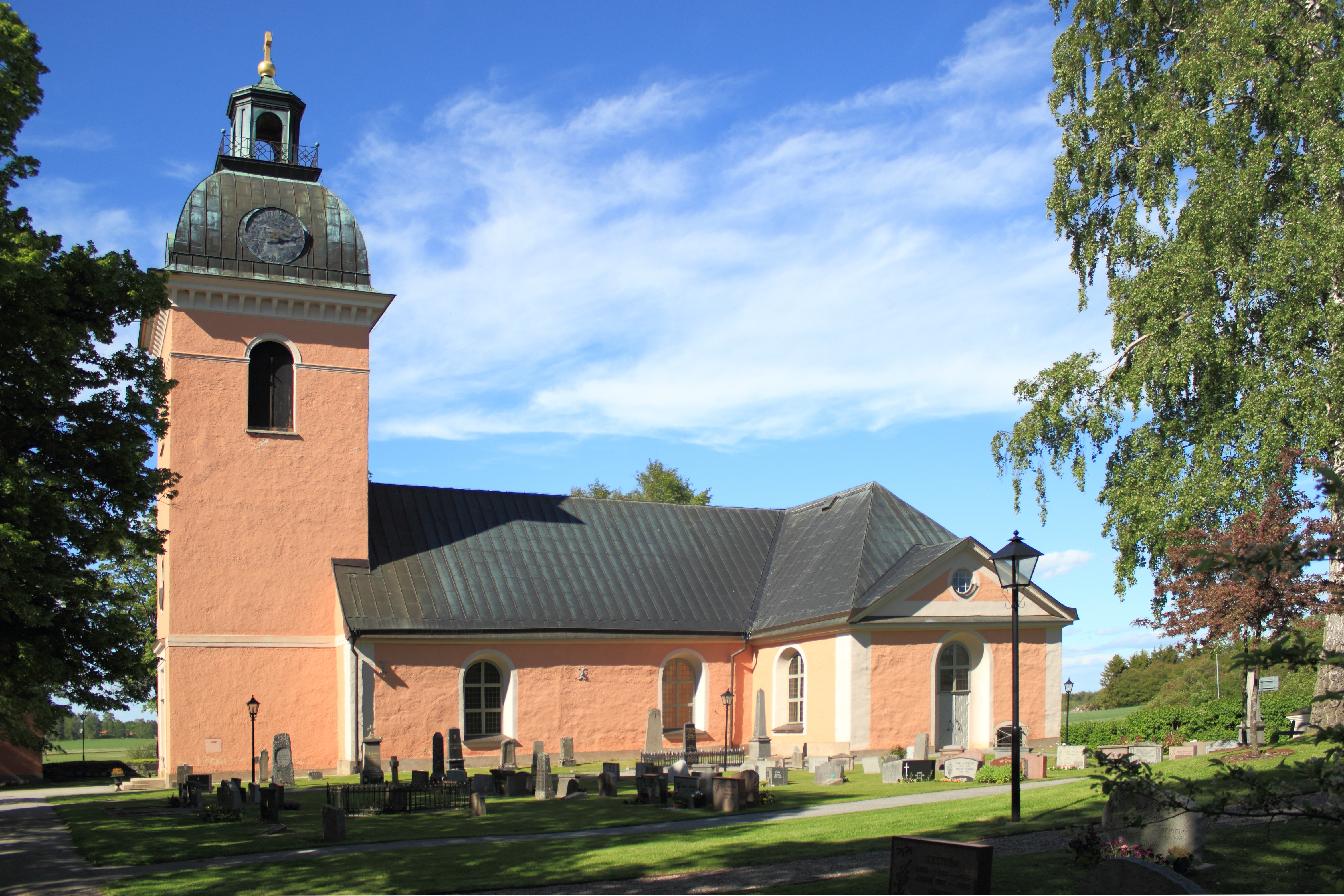 Rinkaby kyrka, Strängnäs stift